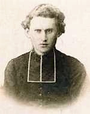 Photographie de Alphonse-Victor Angot